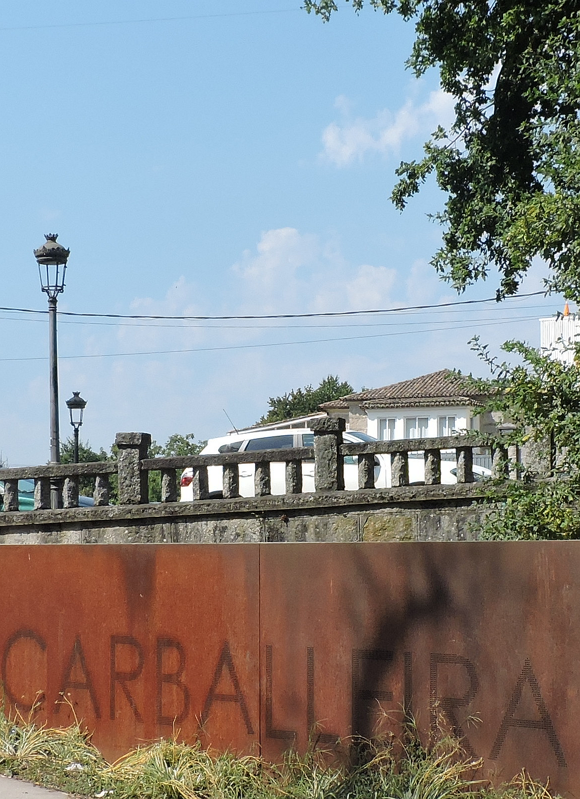 Caldas de Reyes: Carballeira